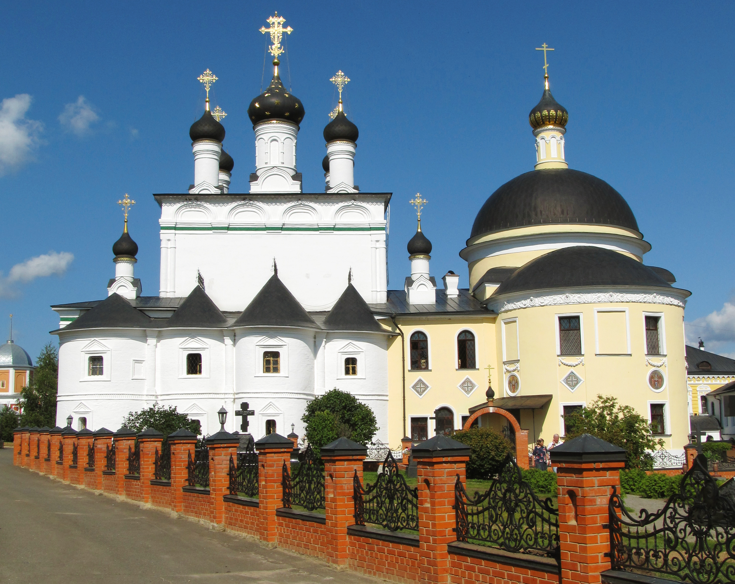 Монастырь «Вознесенская Давидова Пустынь »: Молодежная улица (Давыдова Пустынь), Новый Быт, Чеховский район, Московская область